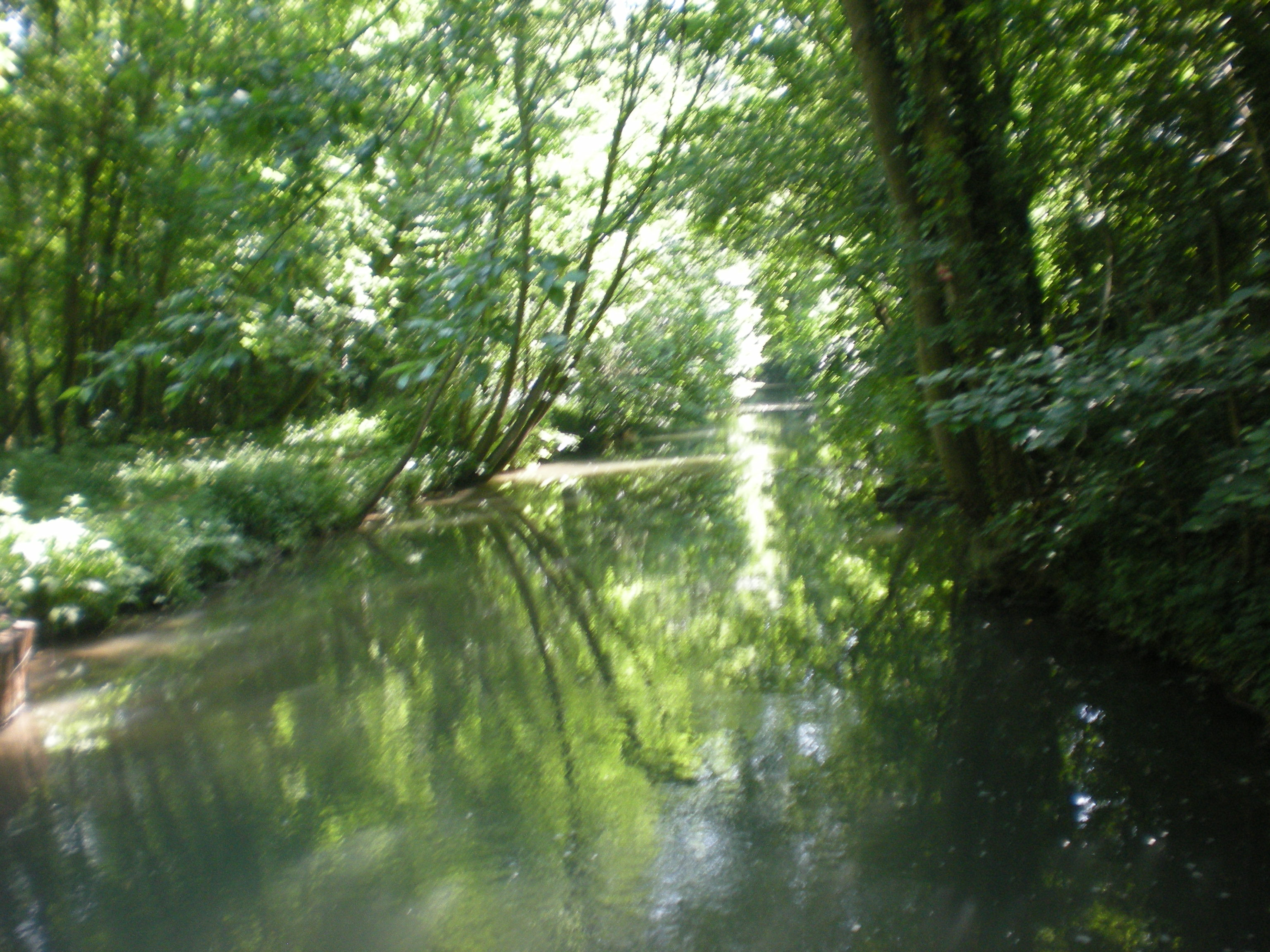 La brêche à Etouy